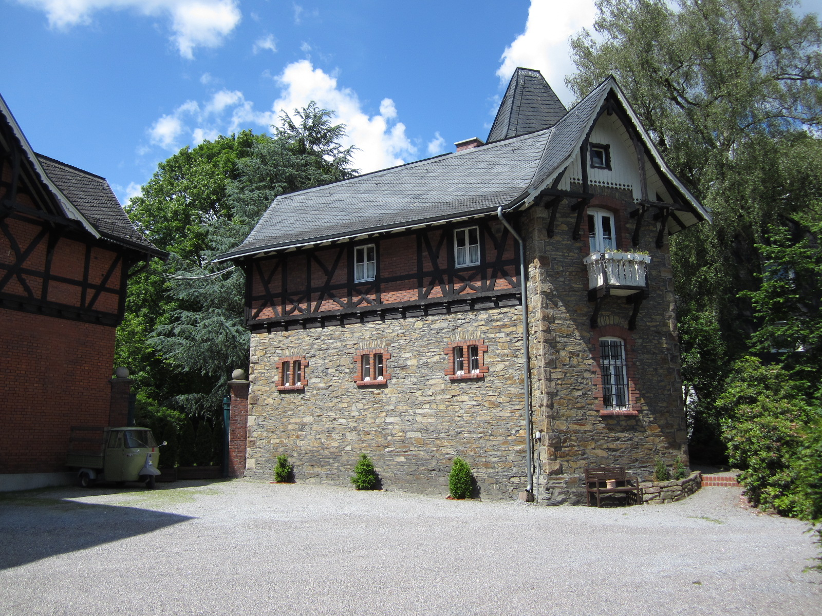 Fassade zum Innenhof